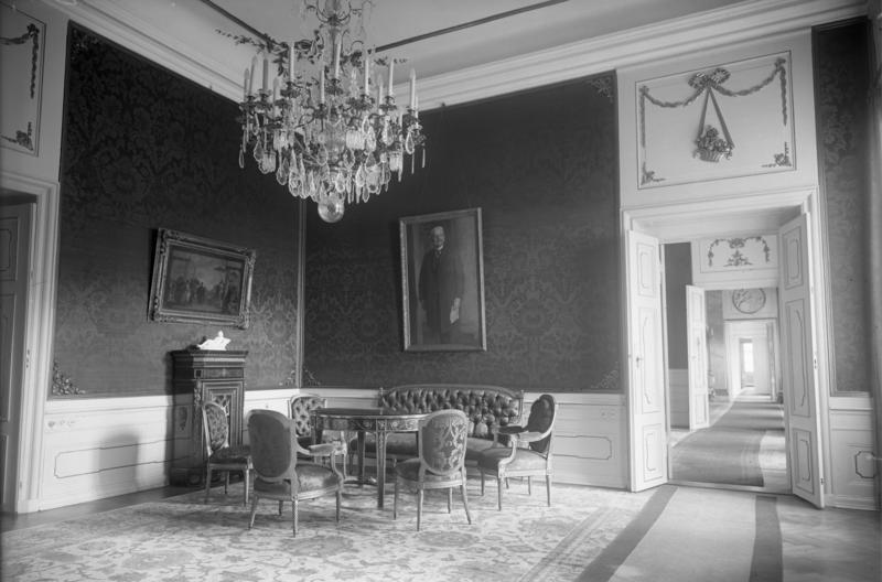 Zur kommenden Präsidentenwahl ! Wo lebt und schafft der deutsche Reichspräsident ! Das Reichspräsidenten-Palais in der Wilhelmstrasse 73 wurde 1839, für den Landjägermeister von Schwerin erbaut. Nach wechselvollem Schicksal ging es 1845 in den Besitz Friedrich Wilhelm IV. über. Bis 1871 war es der Sitz des Gouverneurs von Berlin. Von da an bis zum Jahre 1918 beherbergte es das königl. Hausministerium. Es besteht aus einem Wohnflügel und zwei einem Vorhof begrenzenden Seitenflügeln. Das erste Stockwerk enthält die Gesellschaftsräume und die Privaträume. Das Arbeitszimmer des Reichspräsidenten liegt im Erdgeschoss nach der Gartenseite hinaus. Das Botschaftszimmer im Reichspräsidenten-Palais. Hier empfängt der Reichspräsident die fremden Diplomaten zur Entgegennahme ihrer Beglaubigungsschreiben.